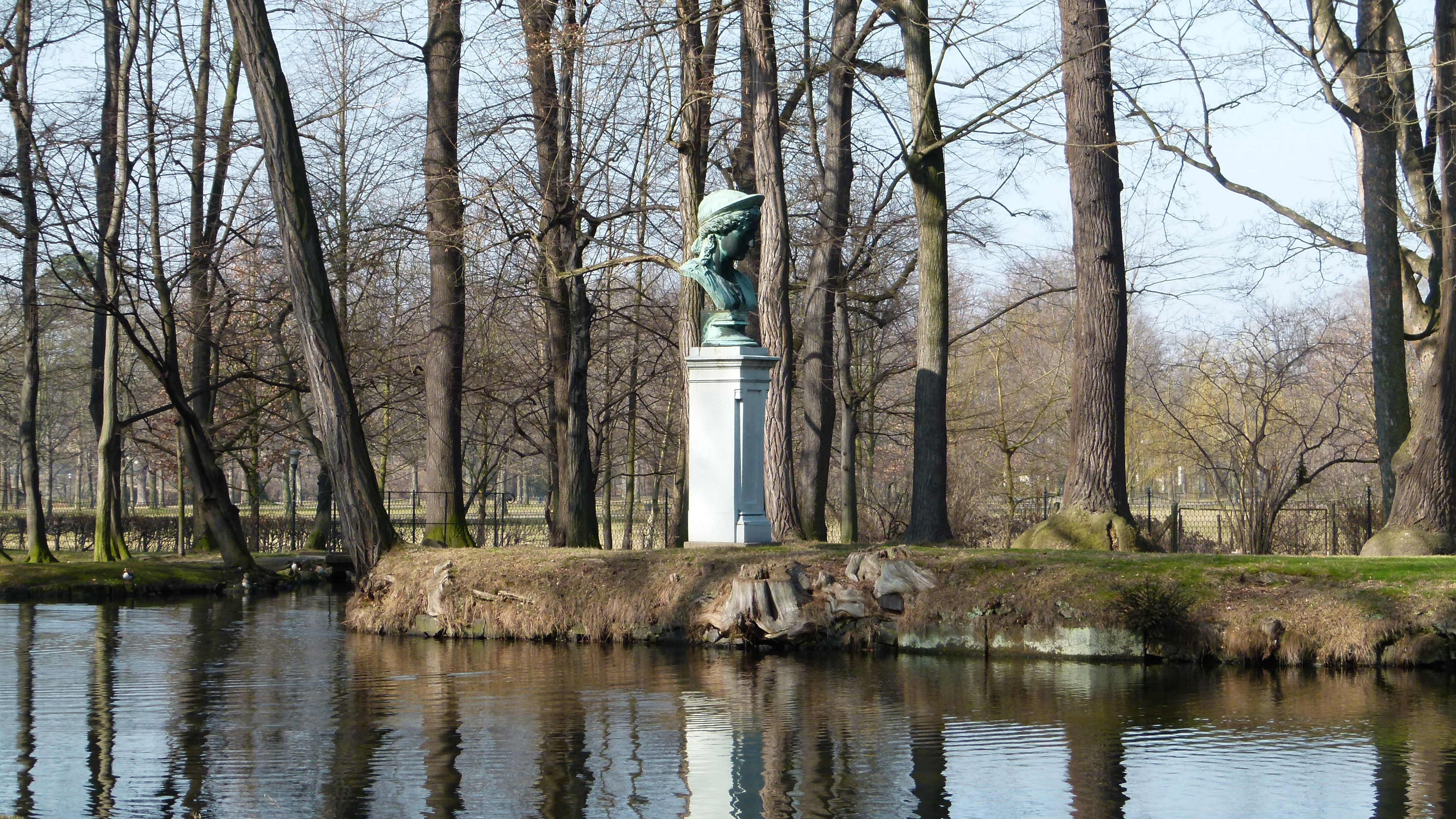 Bronzener Abguss der Juno Ludovisi im Englischen Garten von Schloss Pillnitz, Dresden